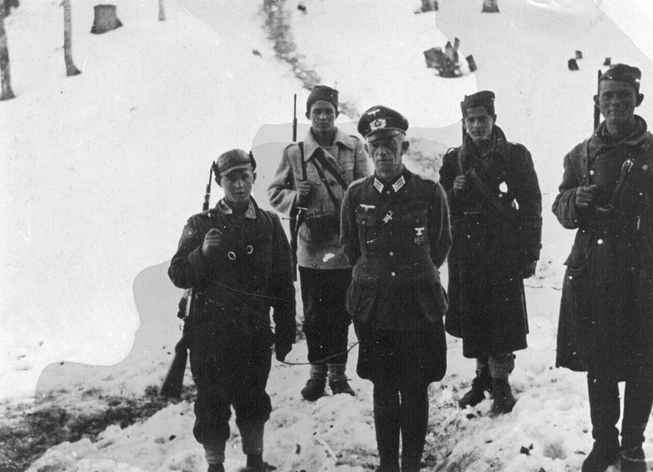 Srpskohrvatski / српскохрватски: Grupa mladih boraca NOVJ sa zarobljenim nemačkim majorom Šterkerom za vreme bitke na Neretvi 1943.